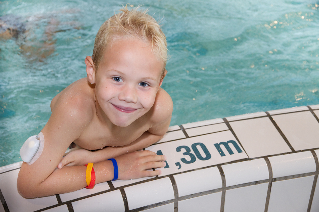 De mylife OmniPod is een insulinepomp in de vorm van een klein half ei, die je met behulp van een pleister direct op de huid plakt. Een aparte infusieset en slangetjes zijn hiermee overbodig. De pomp wordt bediend met de Personal Diabetes Manager, die tevens fungeert als bloedglucosemeter. De canule wordt automatisch aangebracht met één druk op de knop. De pomp is waterdicht en kan dus bij douchen en zwemmen gewoon blijven zitten.